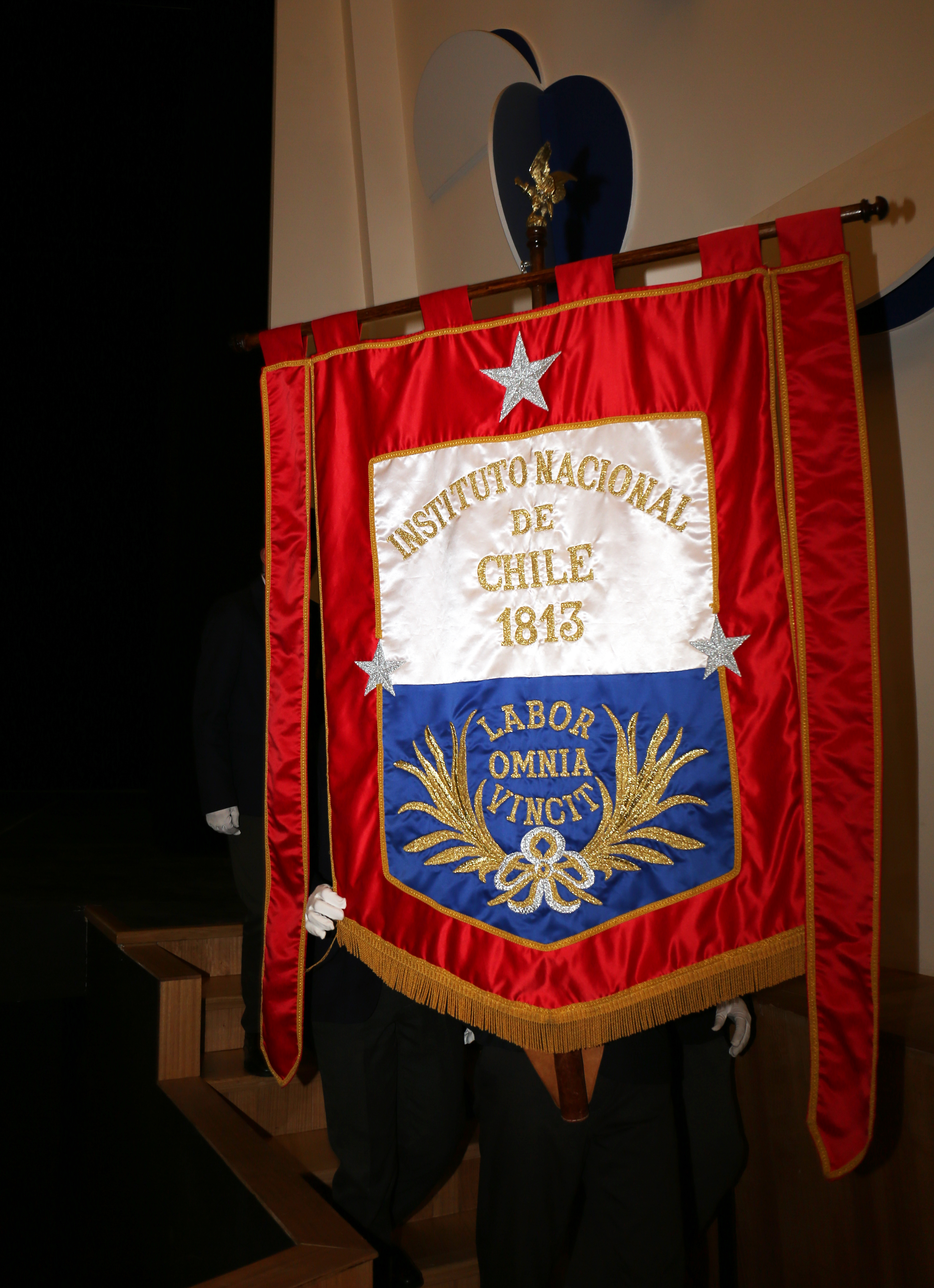 El estandarte histórico es guardado en una vitrina en el pasillo de acceso a la Biblioteca del colegio. Este es del año 2012